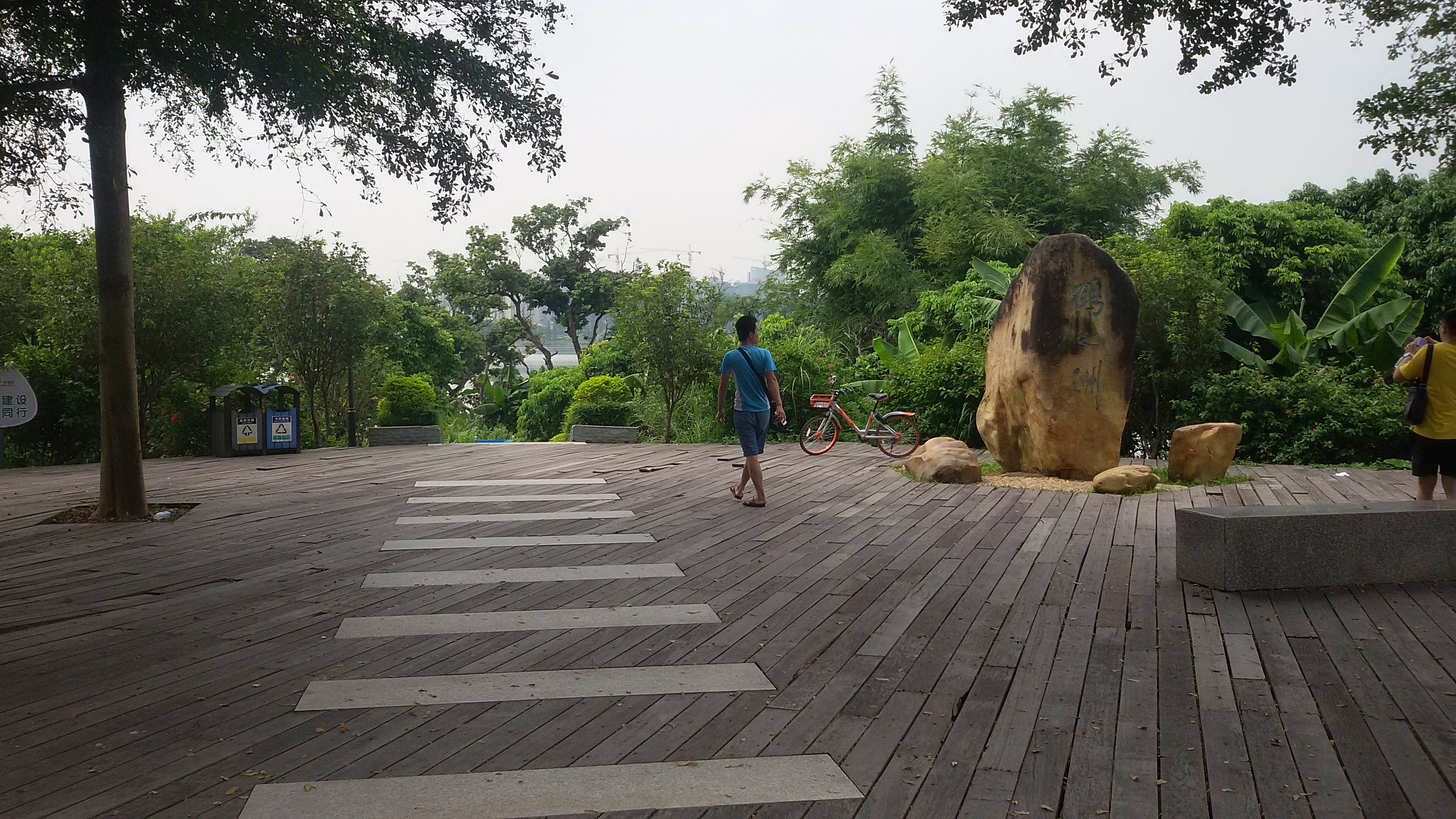 粵語: 鶴之洲濕地公園